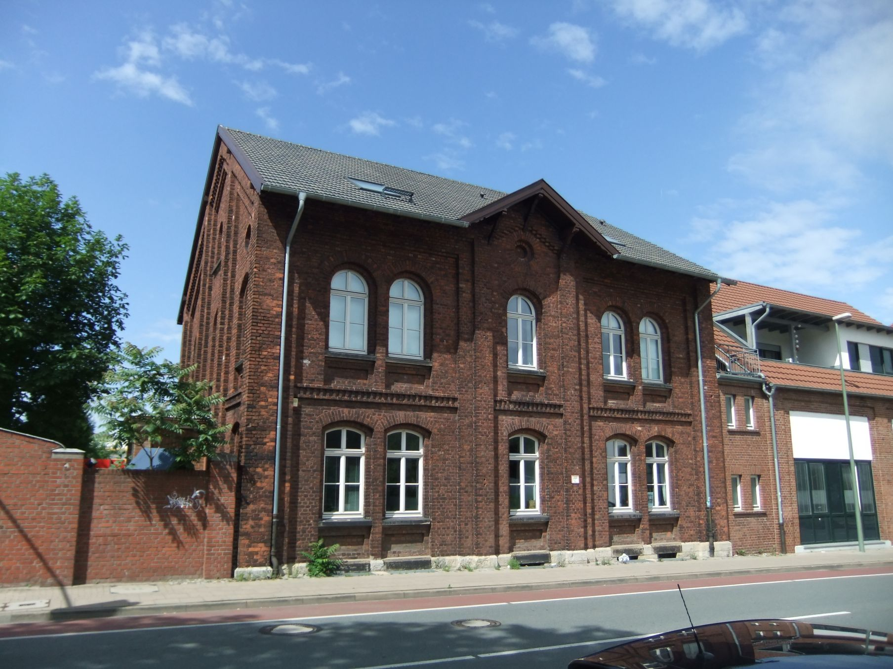 Die Verwaltung des Alten Schlachthofes in Bielefeld.